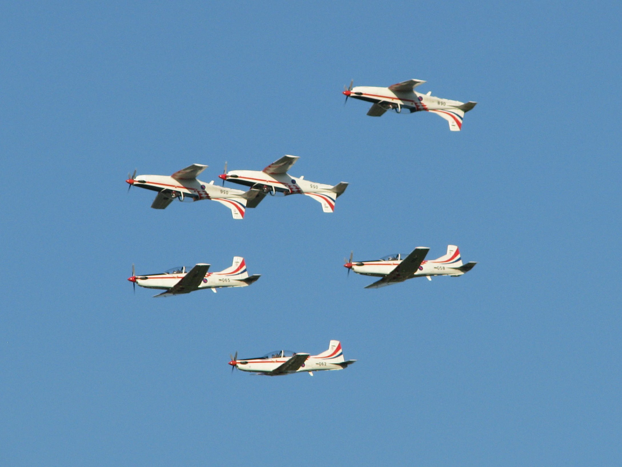 Krila Oluje, Karlovac, 2009.